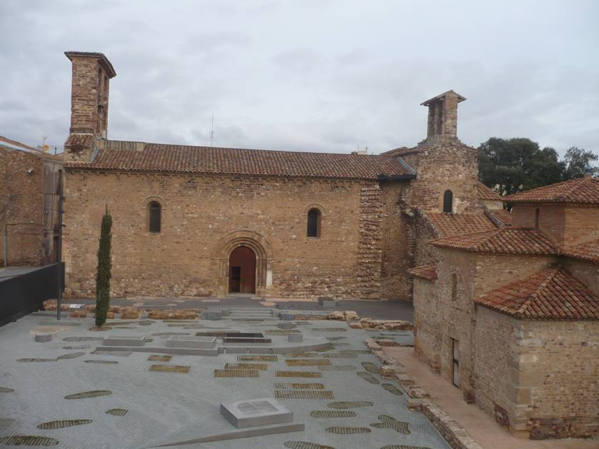 Església Sant Pere de Terrassa. Pertany a l'art visigòtic.